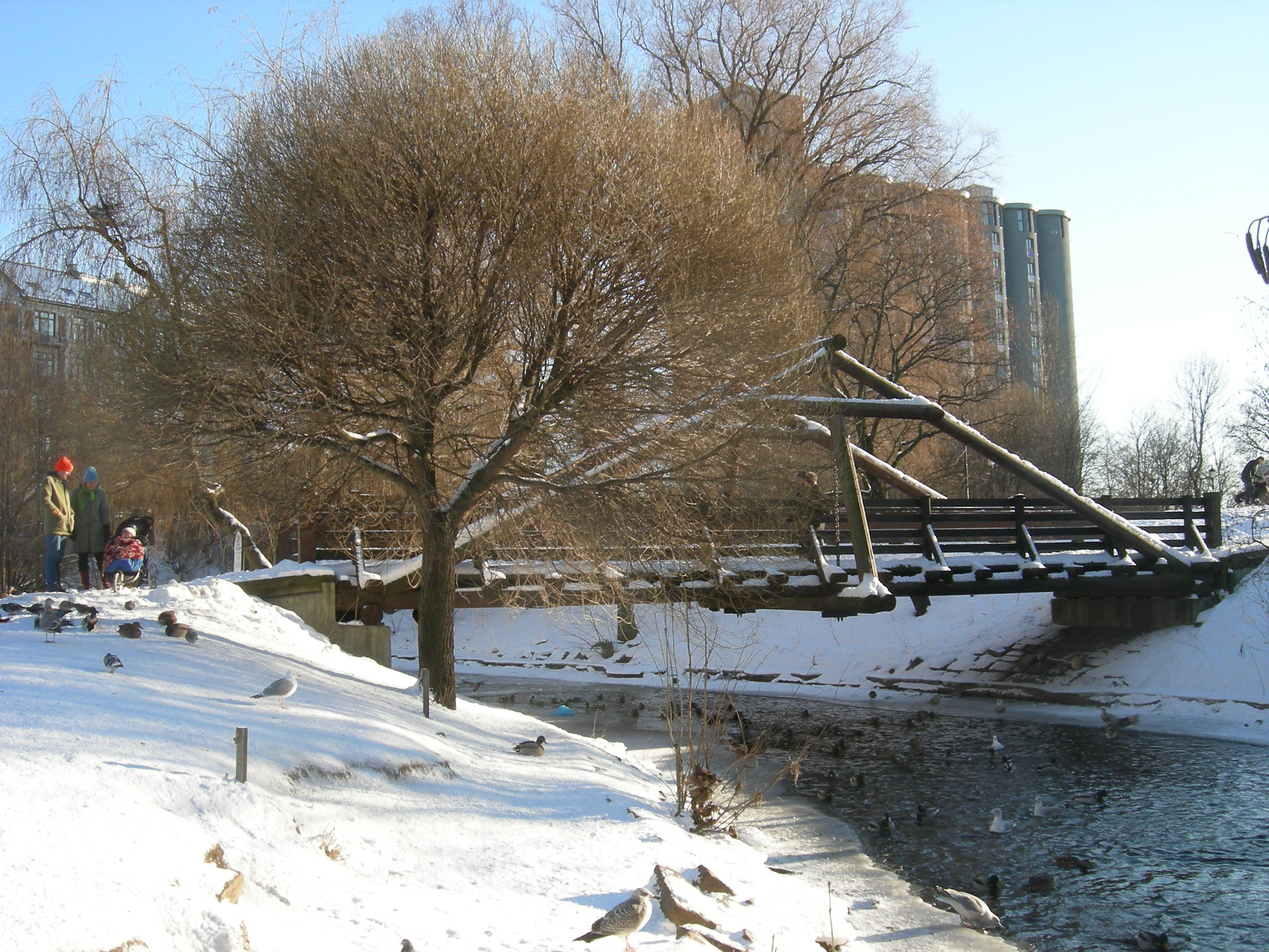 Gangbru på Kuba, Grünerløkka, med fugleliv